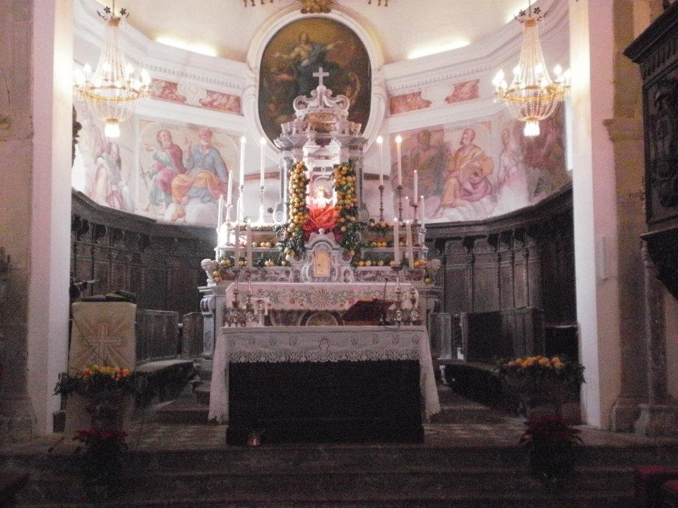 Interni chiesa matrice Savoca